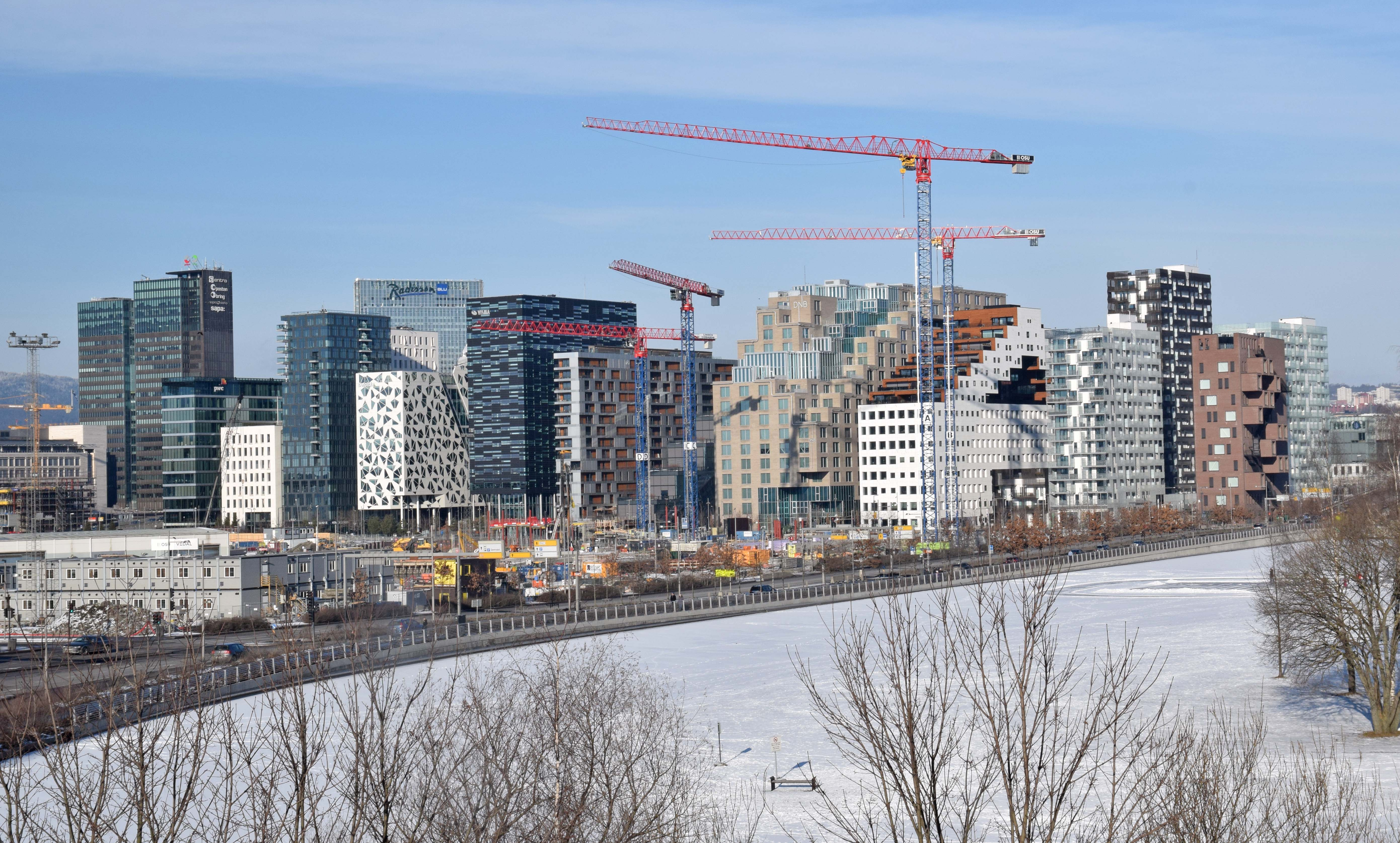 Det ferdige Barcode sett fra gamle Sørenga bru i februar 2017. Middelalderparken i forgrunnen.